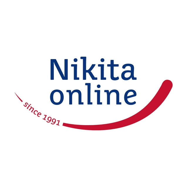 Логотип компании NIKITA ONLINE. Разработан компанией, права принадлежат компании. По всем вопросам обращайтесь по контактным данным на официальном сайте компании Файл загружается с согласия компании её сотрудником.